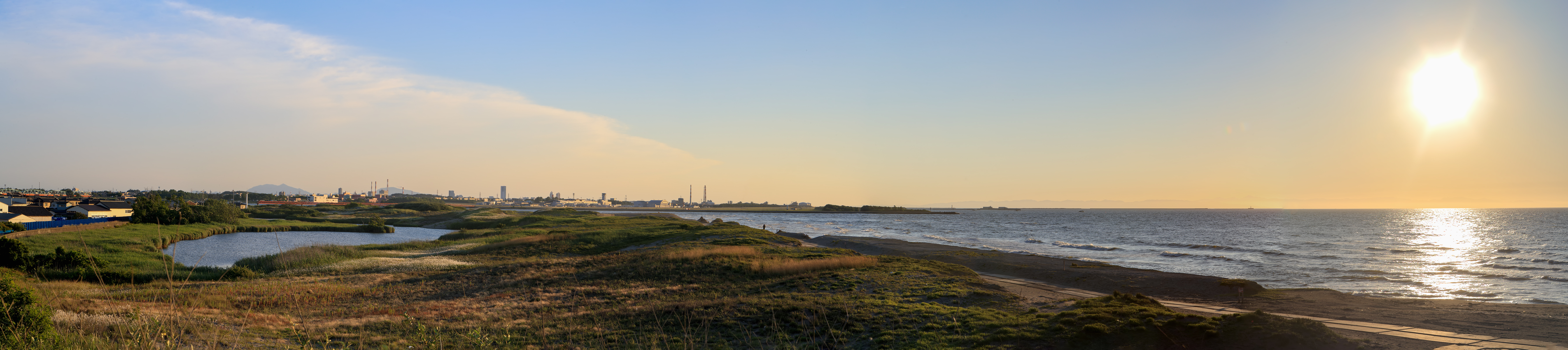 新潟県新潟市北区松浜にある松浜の池。 写真左側が松浜の池で、右側は日本海。